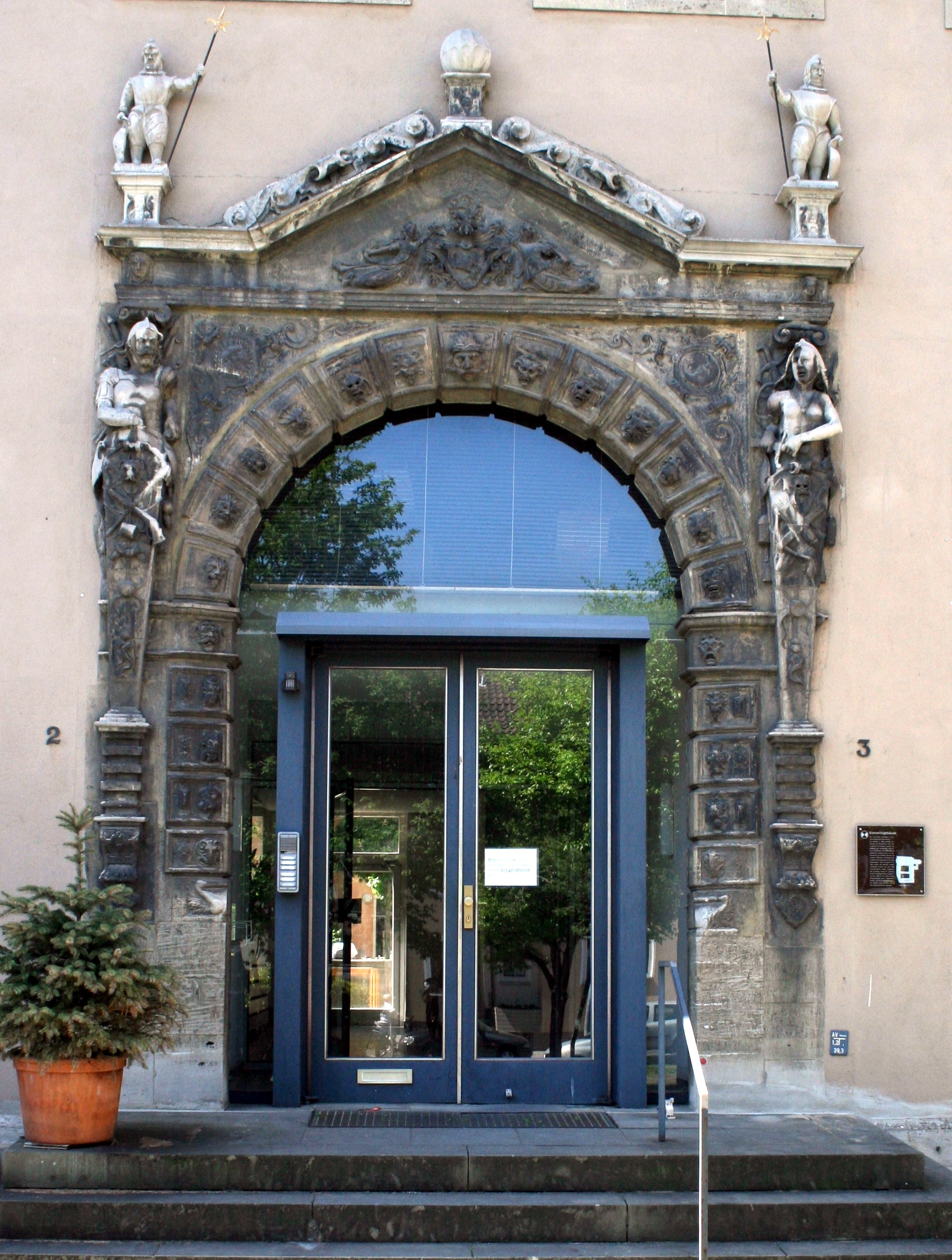 Fröhler-Portal, Konvent des Brüdern-Klosters Braunschweig, Ostseite, unweit der Brüdernkirche. Deutschland